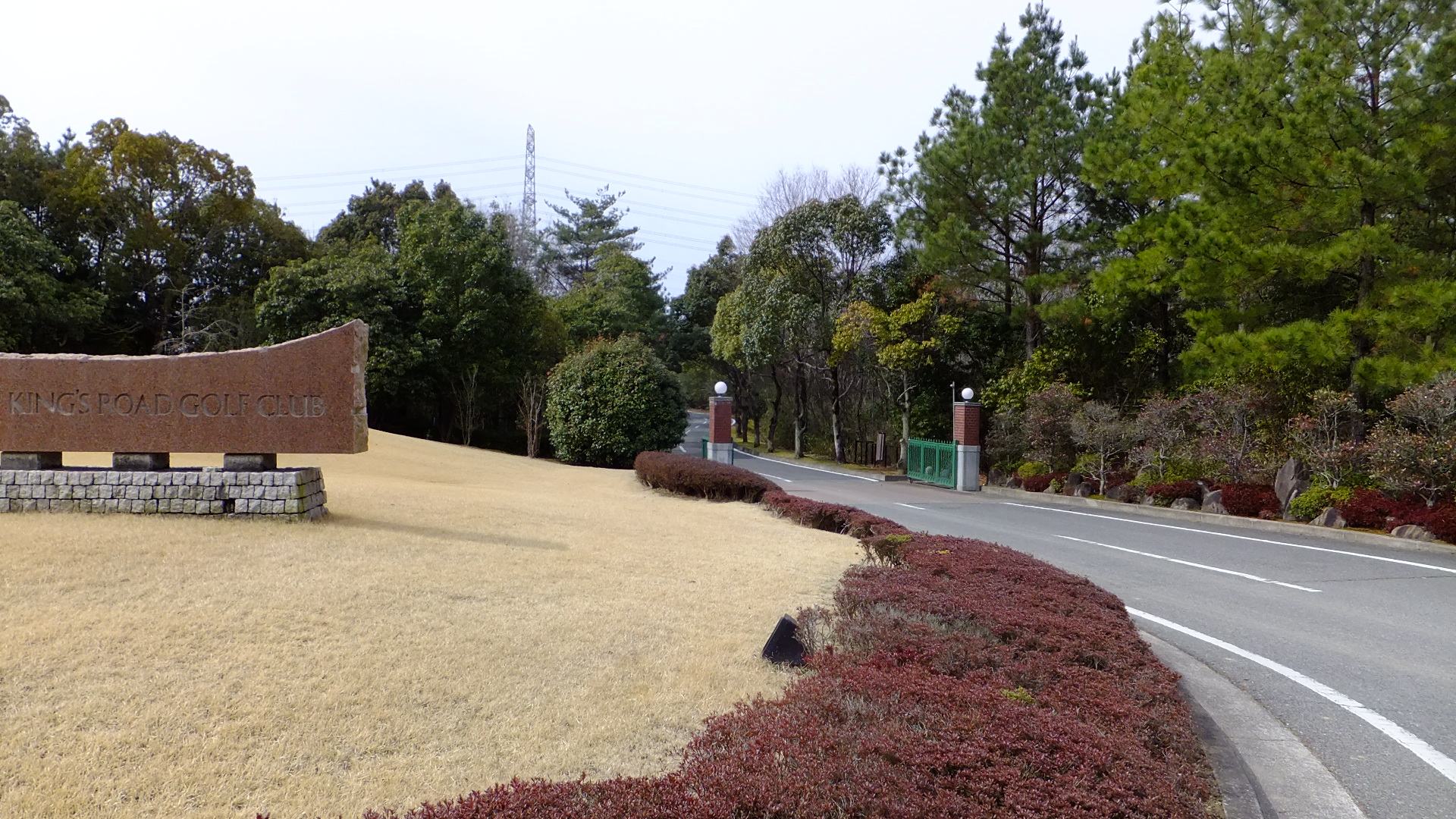 キングスロードGC